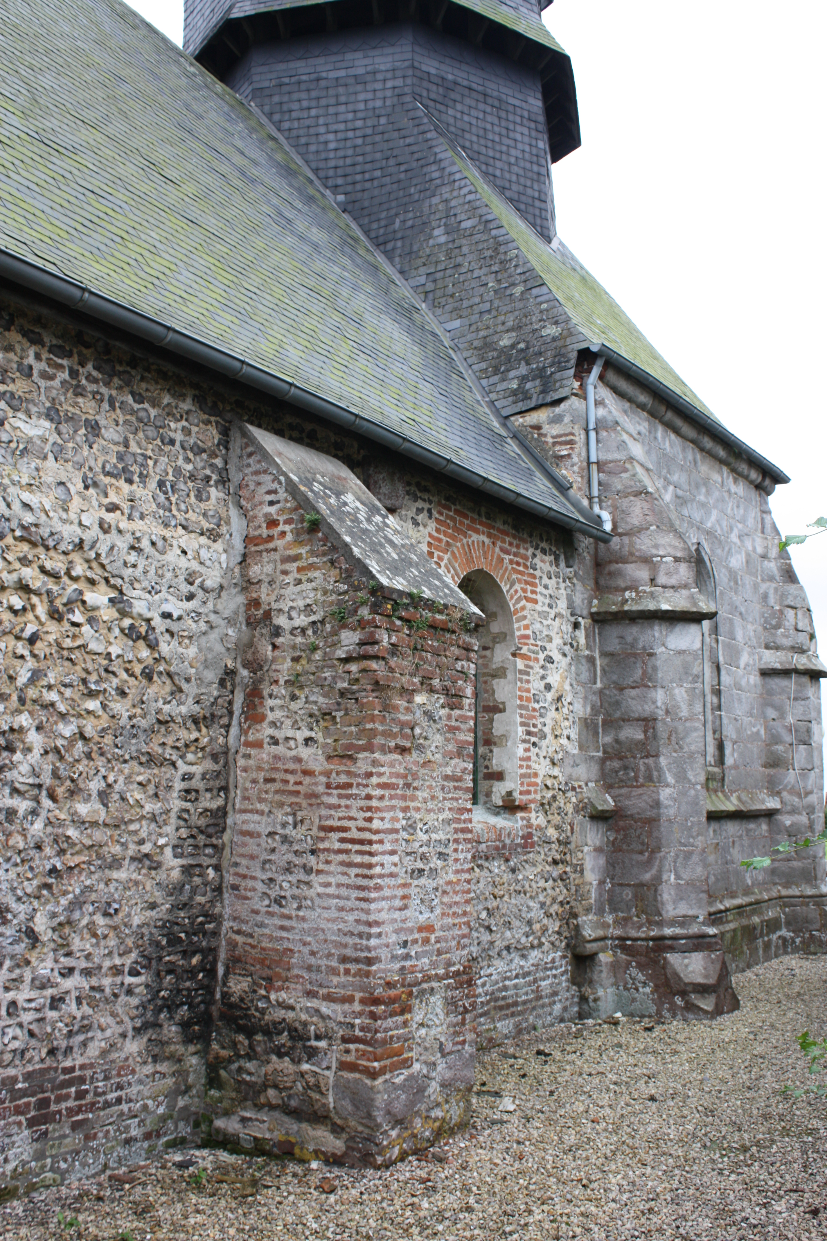 La Chaussée - Eglise Saint-Jean-Baptiste Vue du Sud-Est